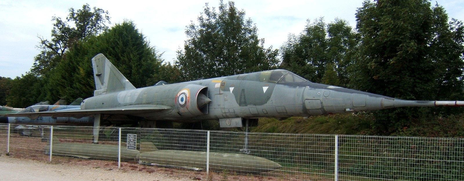 Mirage IV A conservé au musée du château de Savigny-les-Beaunes